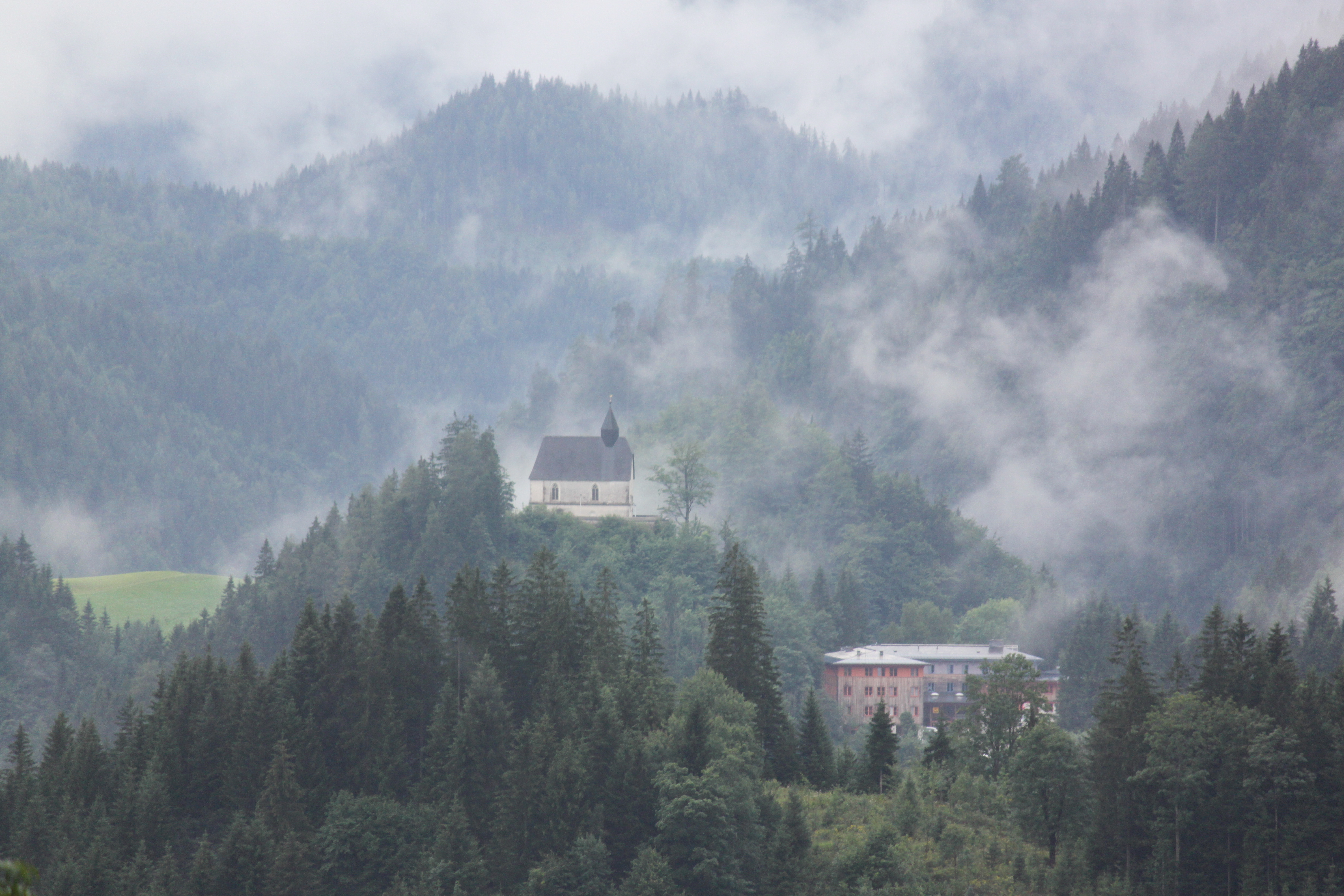 Kath. Filialkirche hl. Sigmund mit Kirchhof, rechts davon etwas tiefer JUFA Mariazell Familien-Resort Sigmundsberg